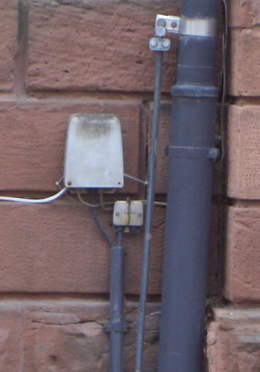 Endverzweiger EVza78 und Hausübergabepunkt